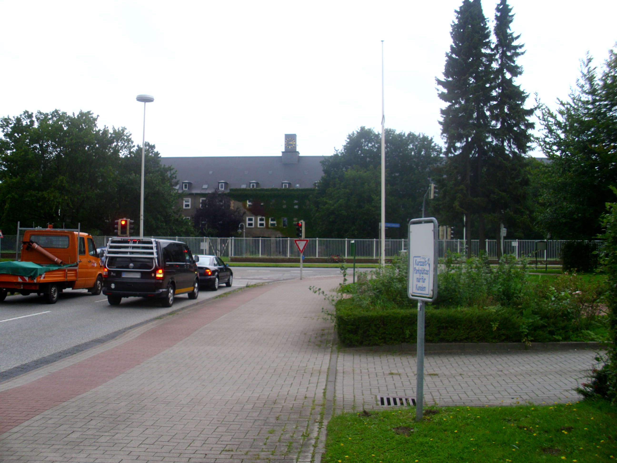 Altes Haupttor der Rüdel-Kaserne (später Feldwebel-Schmid-Kaserne).